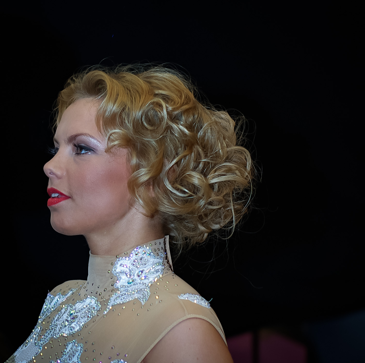 Linda Lezdiņa (Feldberga), lašāk pazīstama ar savu skatuves vārdu Linda Leen.